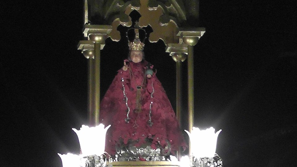 procesión del 14 de enero de 2014